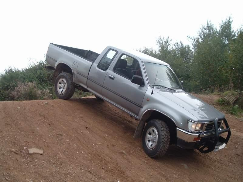 VW Taro